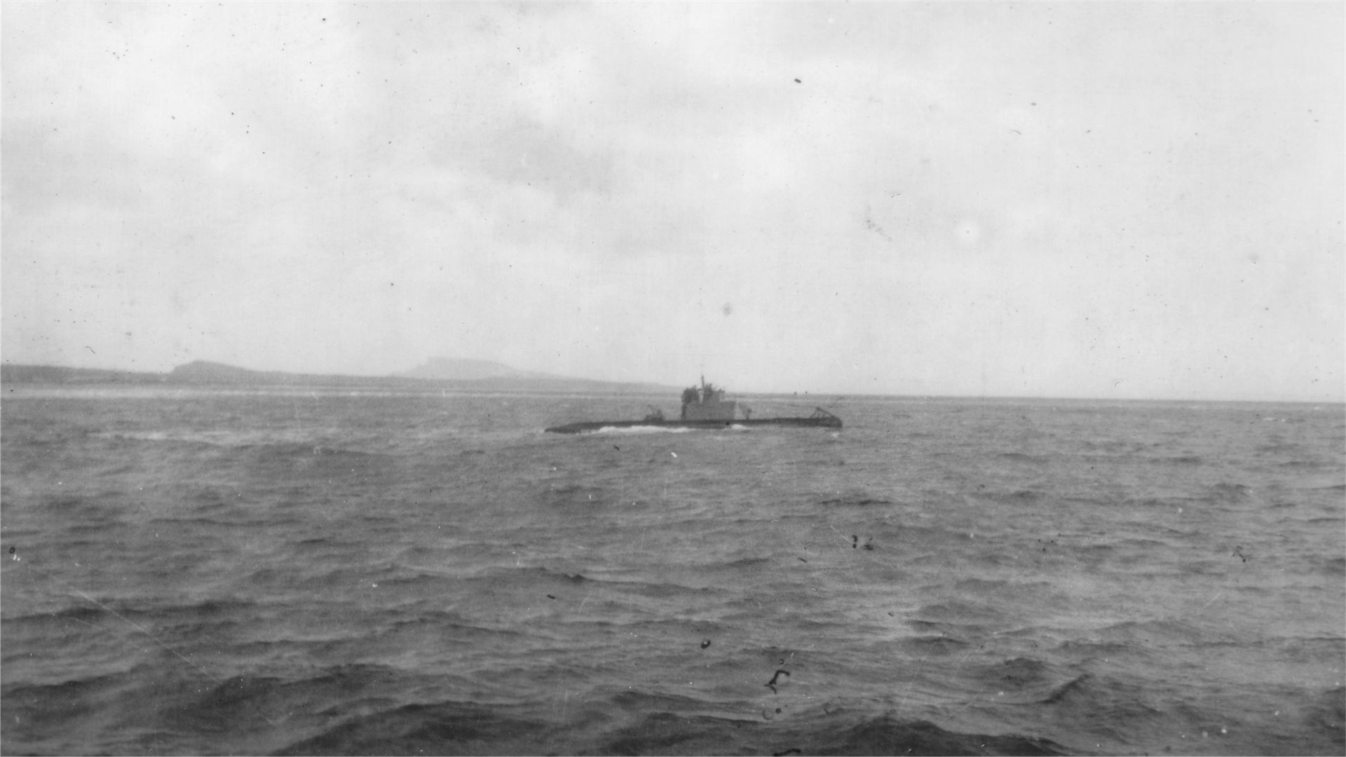 De 013 op terugreis naar Nederland